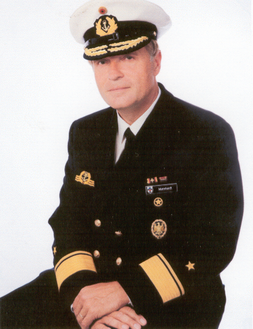 Porträtfotografie von Flottillenadmiral Jürgen Mannhardt